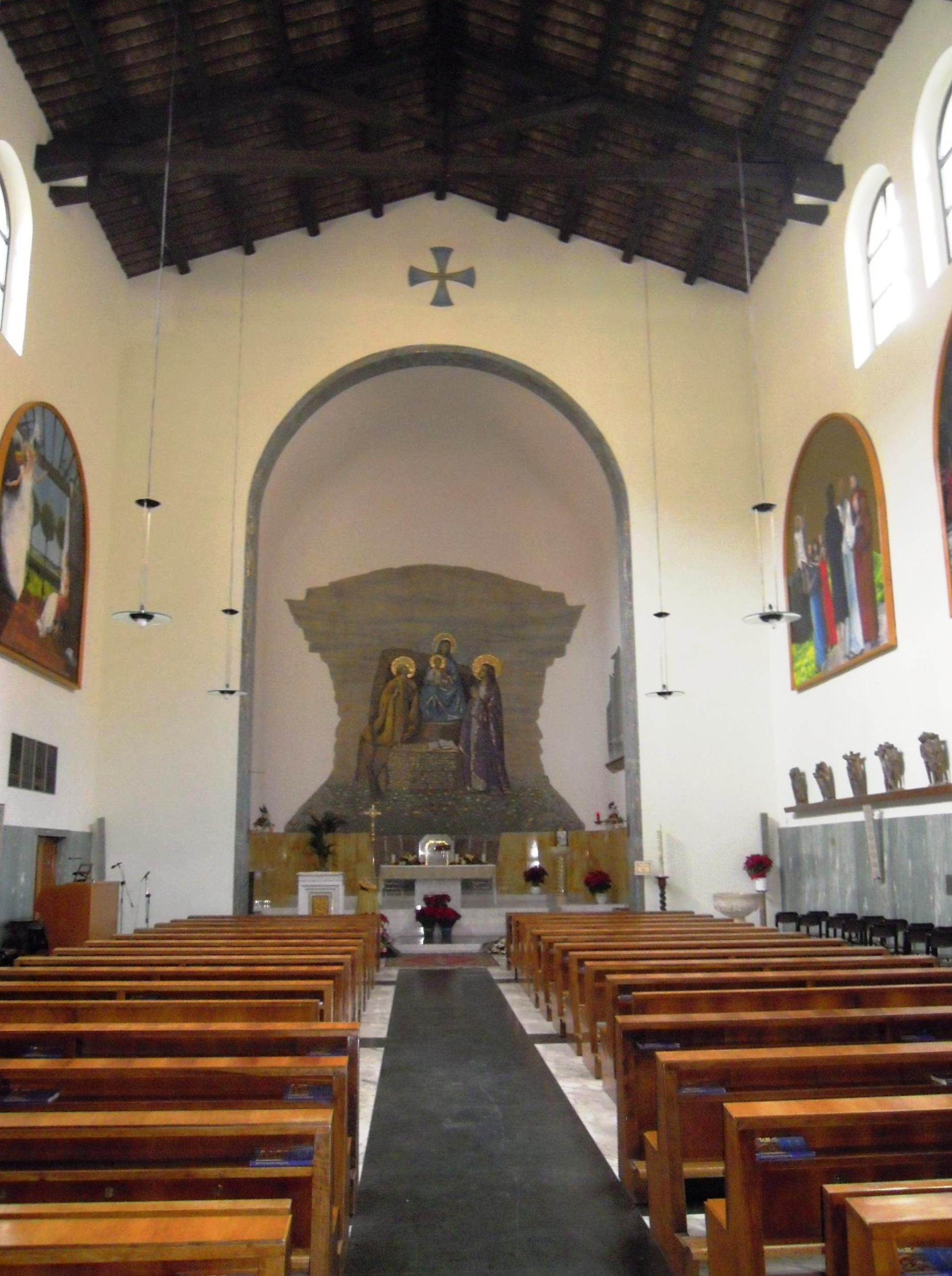 Interno a navata unica della chiesa.